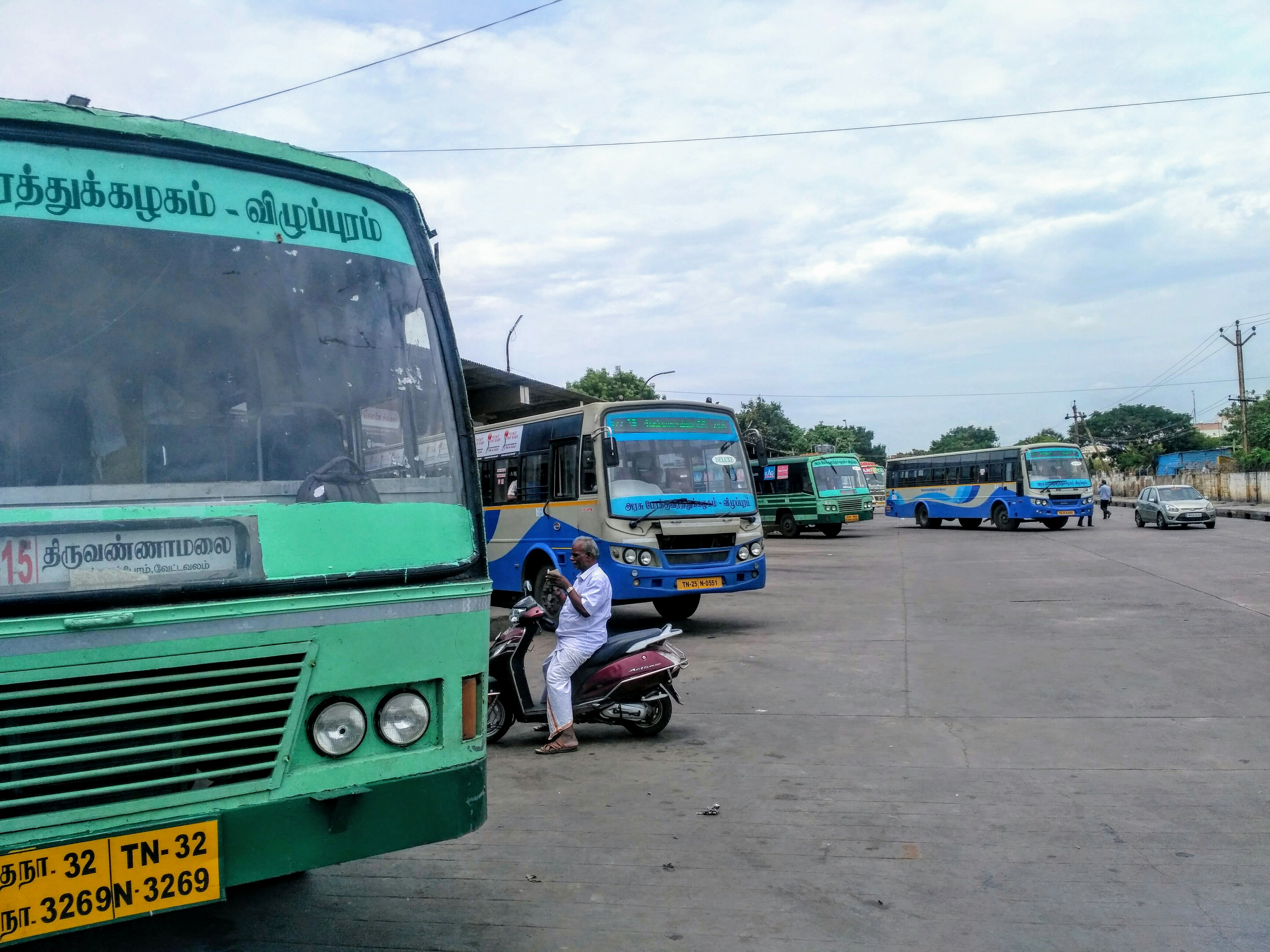 விழுப்புரம் பேருந்து நிலையத்தின் உட்பகுதி..